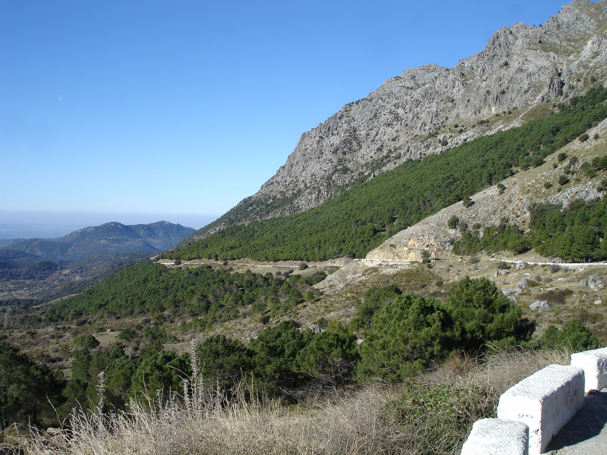 Vista del Torreón desde el Puerto del Boyar